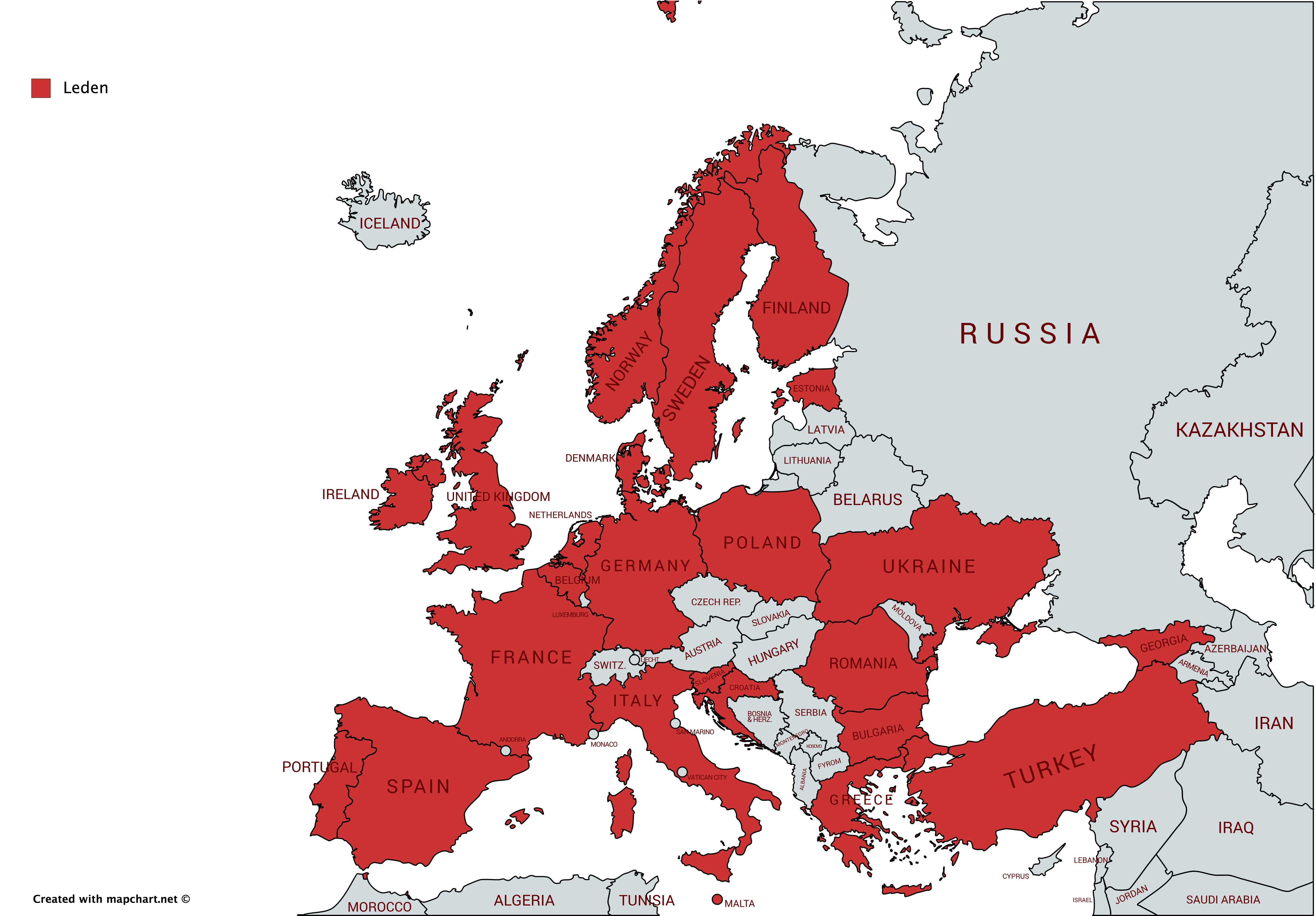 Leden van EMPA in het rood